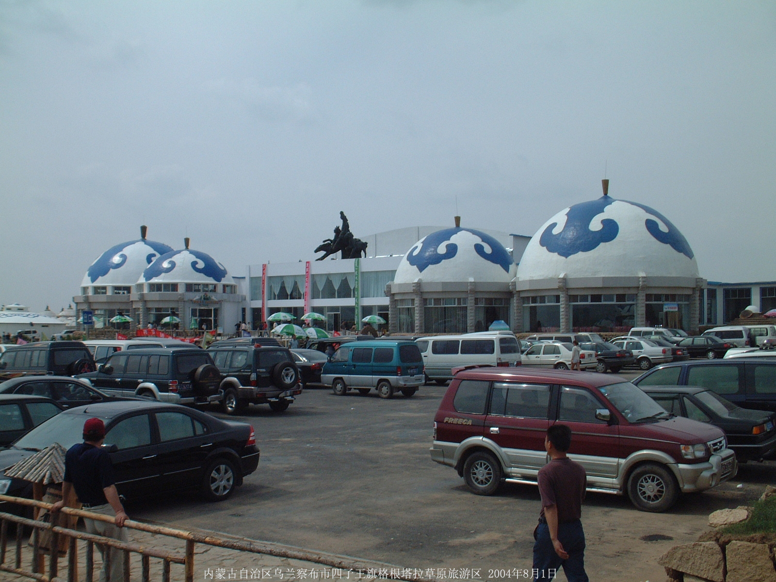 格根塔拉草原旅游区饭店